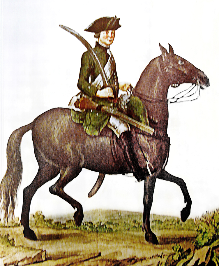 Kurhannoversches Freytagsches Jäger-Corps